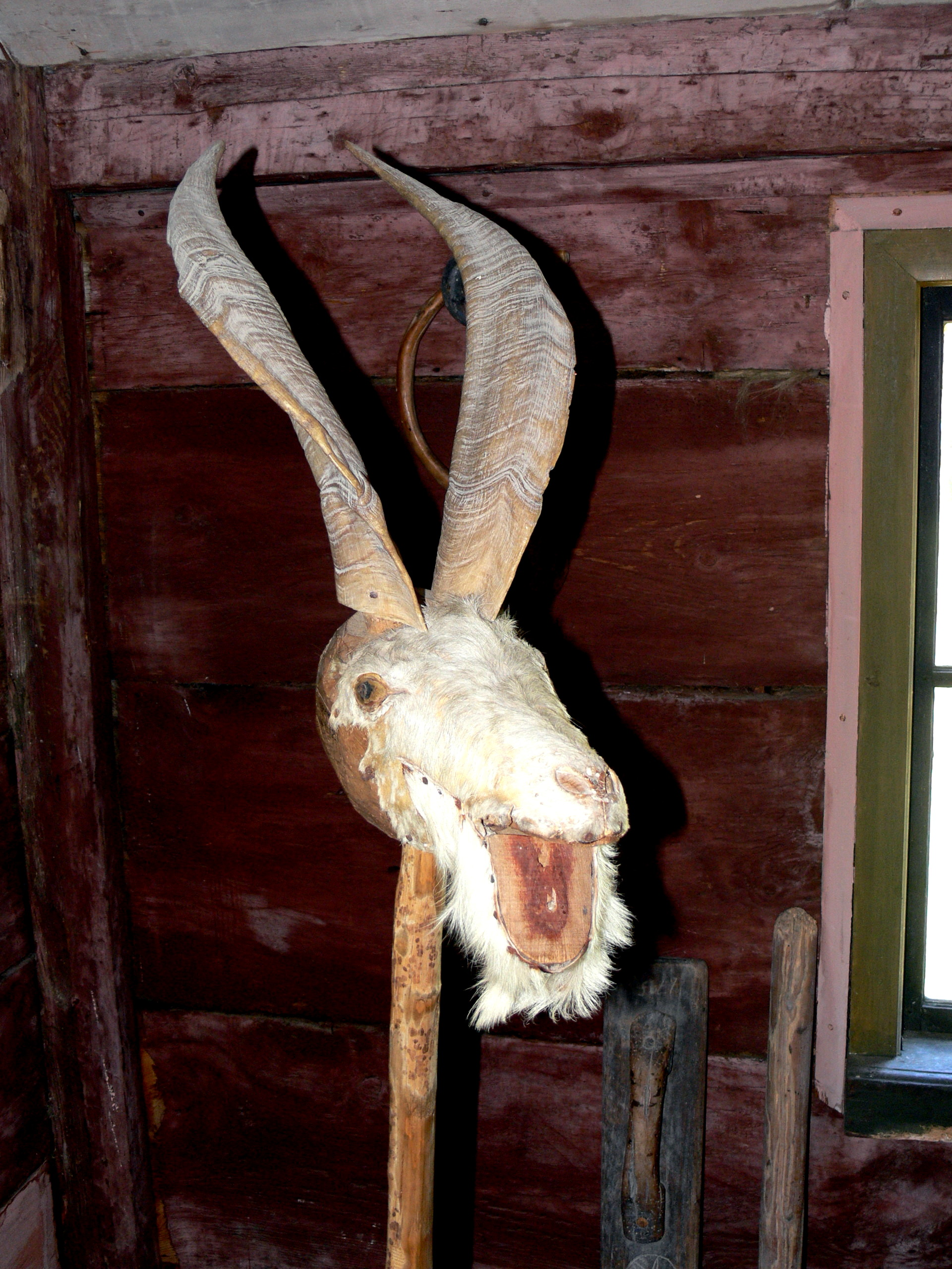 Bunge Museum auf Gotland. Hof ( 18.Jhdt. ): Julbock